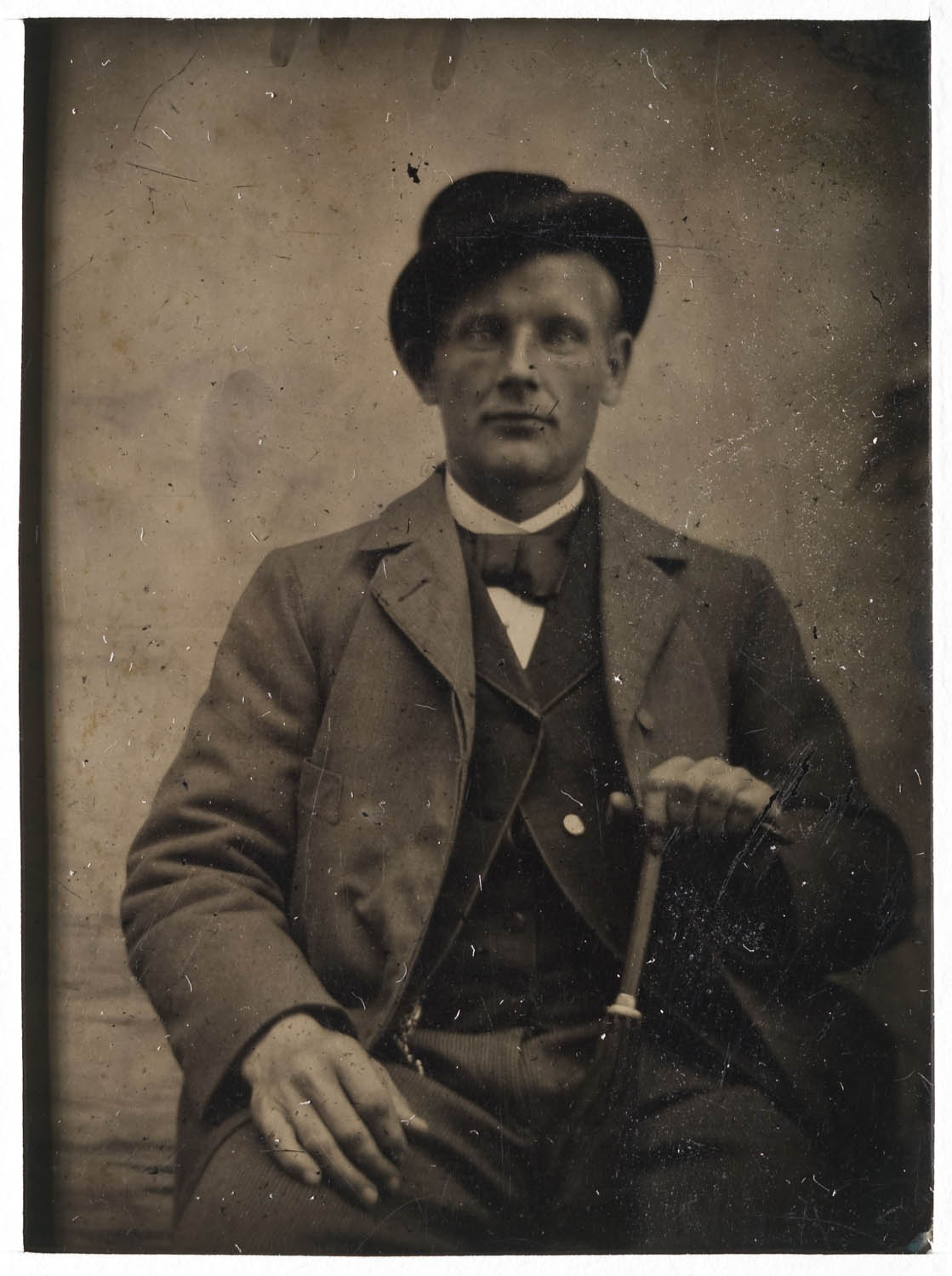 Mansporträtt. Ferrotyp, fotografisk bild på järnplåt, utan montering. Porträtt av man, knästycke, fas. Mannen tittar, något vindögt, rakt in i kameran. Iklädd ytterrock, rock, väst, vit skjorta med svart halsduk, randiga byxor och hatt. I bakgrunden något skrynklig enfärgad fond. Mått 4.3 x 5.5 cm, Tj 1 mm. Nordiska museet inv.nr 302360.